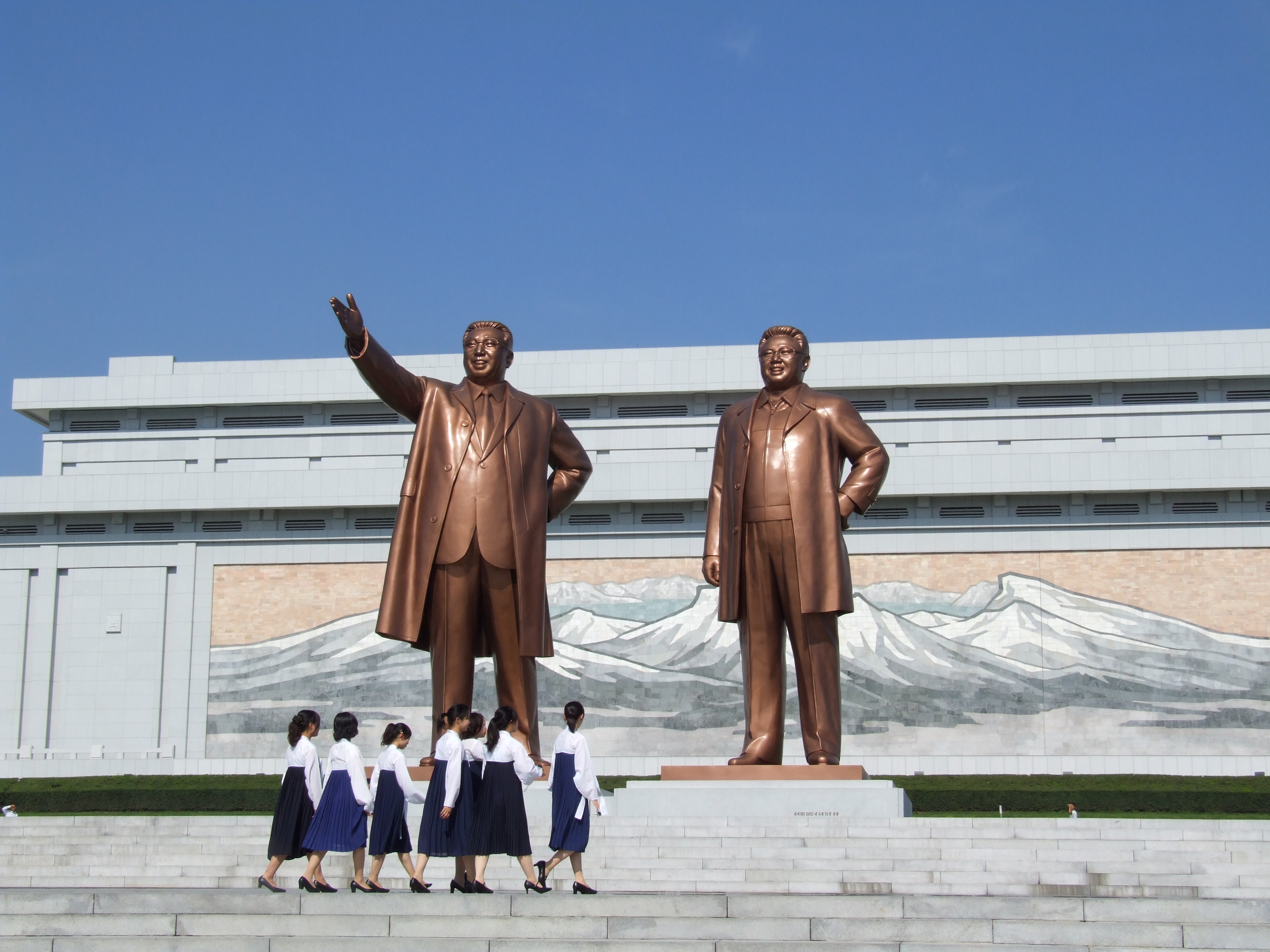 Großmonument Mansudae